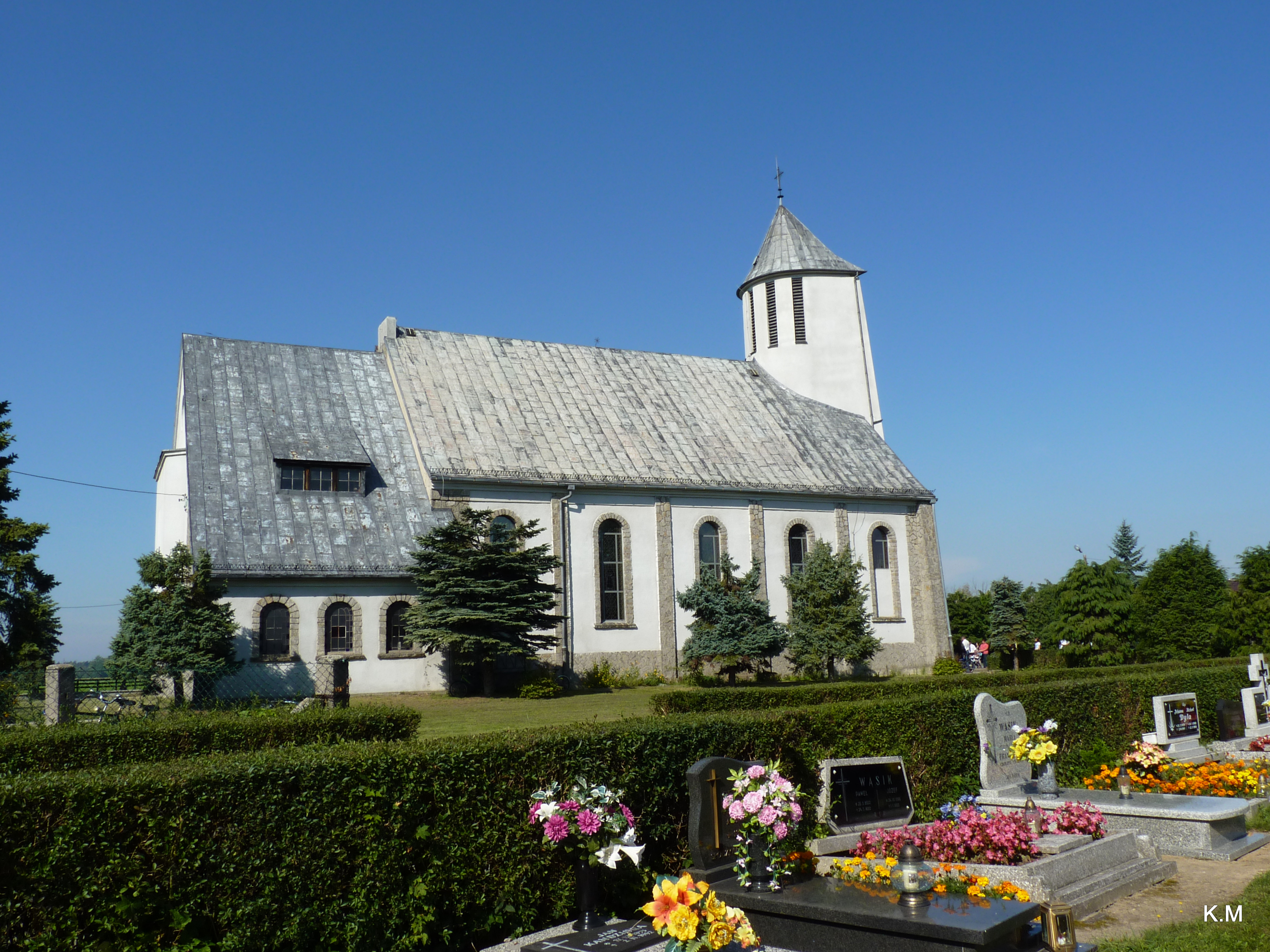 Sowczyce - kościół p.w Św . Antoniego z Padwy. ( pobudowany obok starego drewnianego)